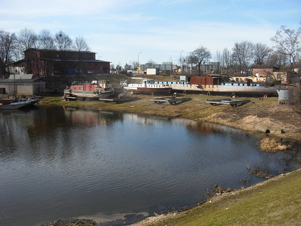 Port Żeglugi Bydgoskiej